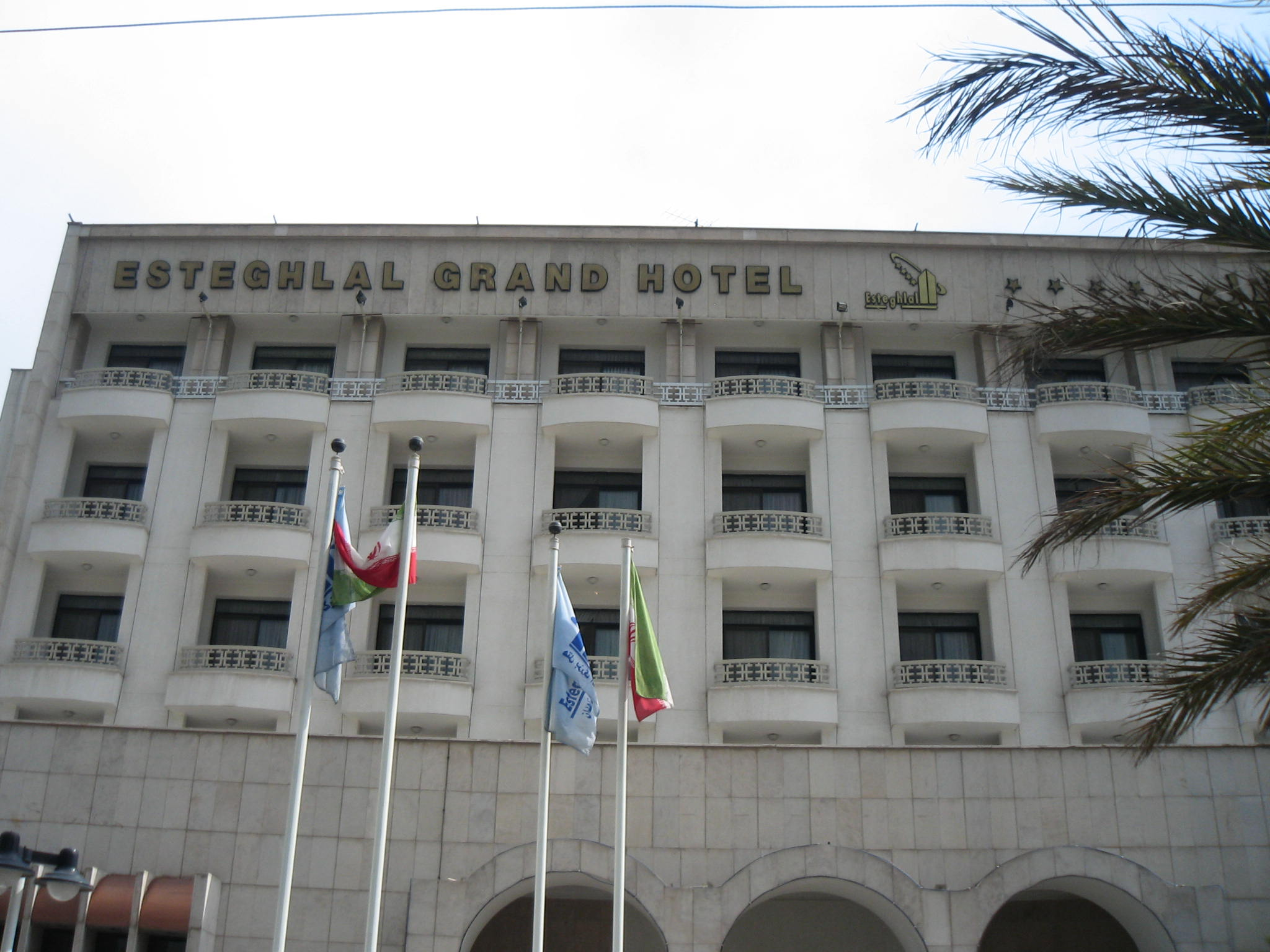 عکس : رضا کلانی